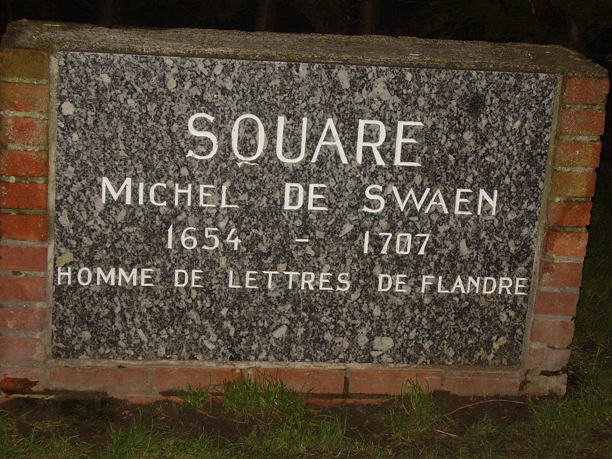 inscription Square_Michel_de_Swaen_Coudekerque-Branche_29-12-2006.jpg